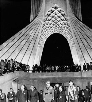 Inauguration de la tour Shahyad Aryamehr à Téhéran. On peut voir le Chah d'Iran au centre de la photo.